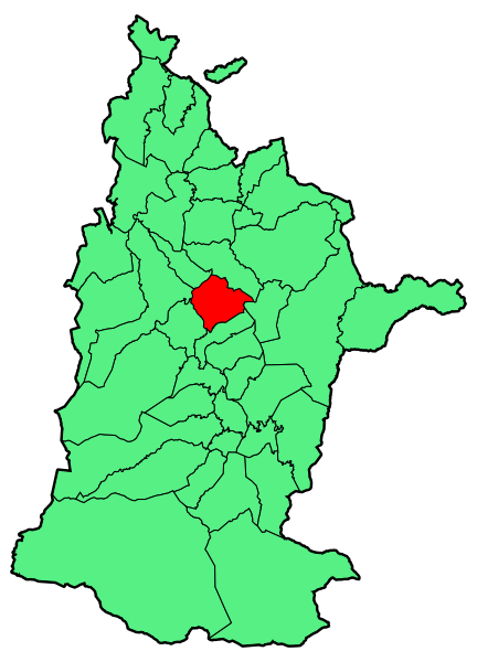 Aipaturiko udalerriaren kokapena Zuberoan